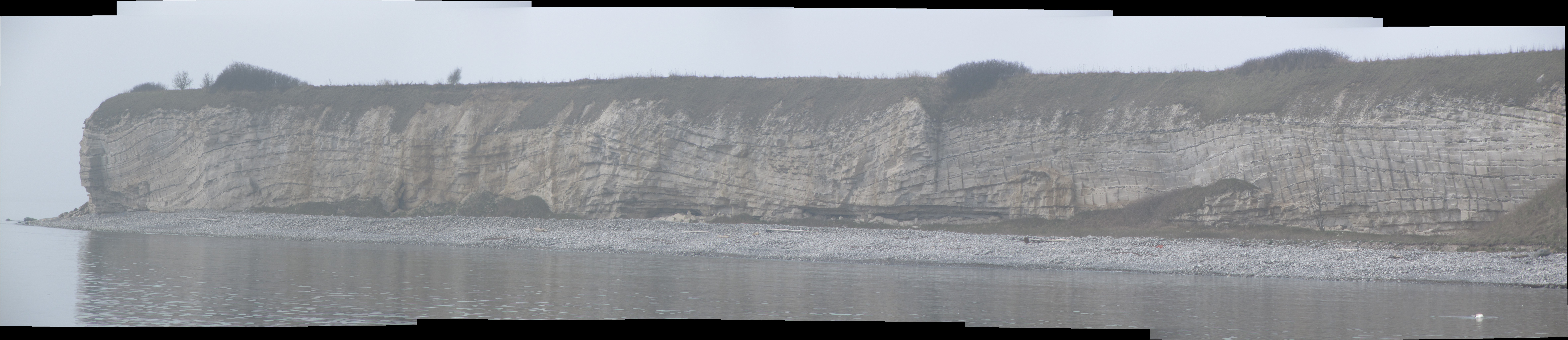 Bryozobanker i Stevns klint, set fra stranden ved Boesdal kalkbrud (i let diset vejr)